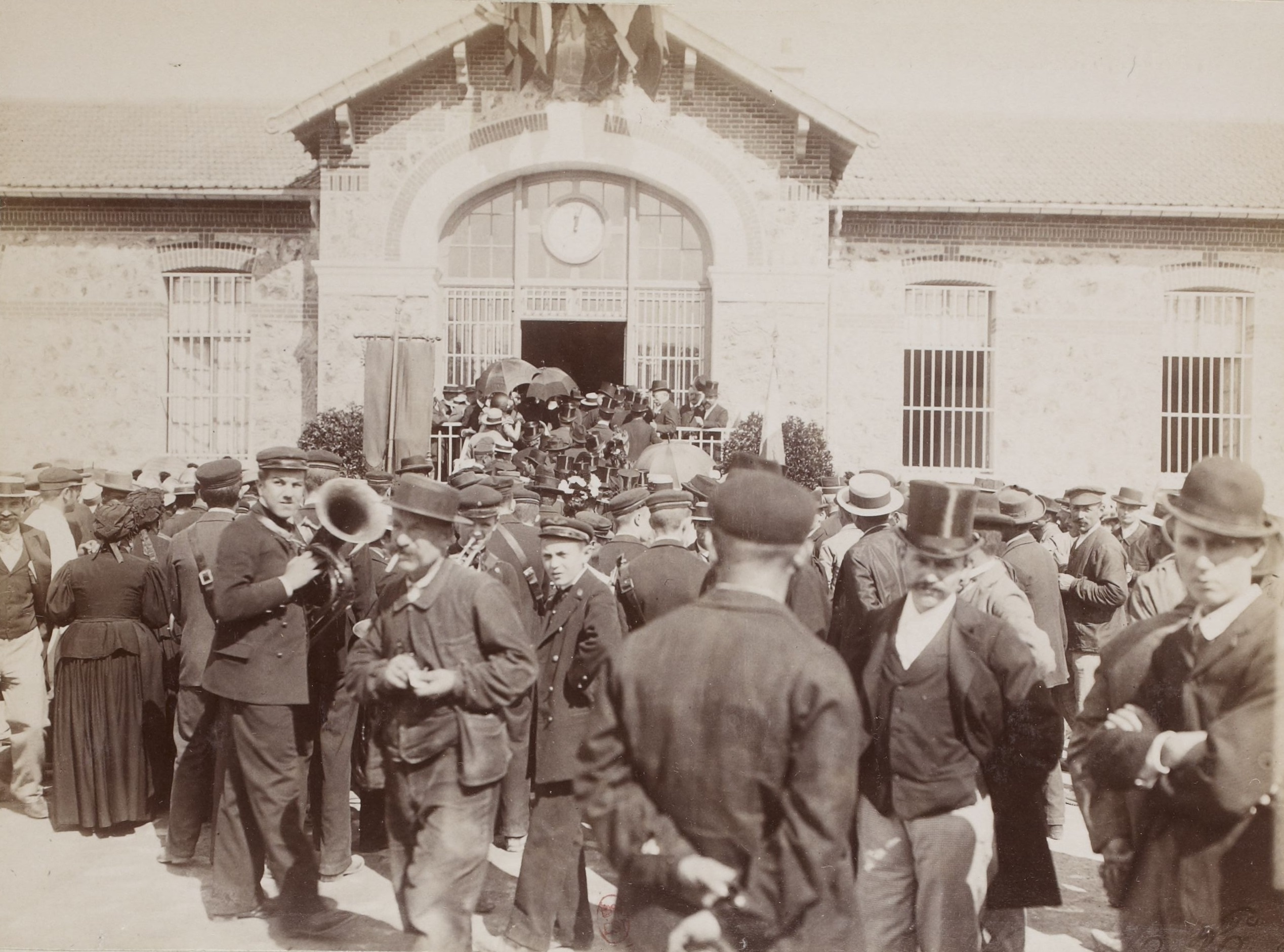 [Collection Jules Beau. Photographie sportive] : T. 7. Année 1898 / Jules Beau : F. 32. [Inauguration de la prison de Fresnes, juillet 1898]